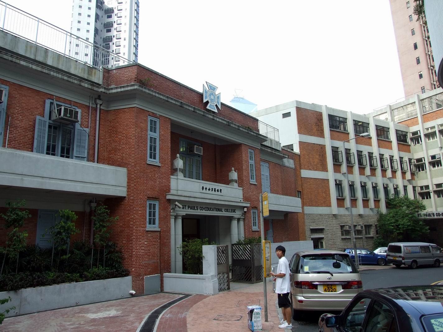 聖保羅男女中學